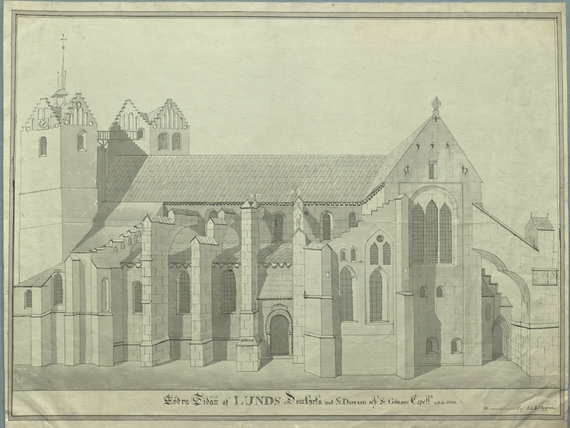 Kyrkan från söder. Akvarellerad pennteckning av J. G. Liljegren från 1800-talets början, efter ett original från 1750. Motiv: Lunds domkyrka Kategori: Akvarell, (01) ExteriörerKyrkan från söder. Akvarellerad pennteckning av J. G. Liljegren från 1800-talets början, efter ett original från 1750.